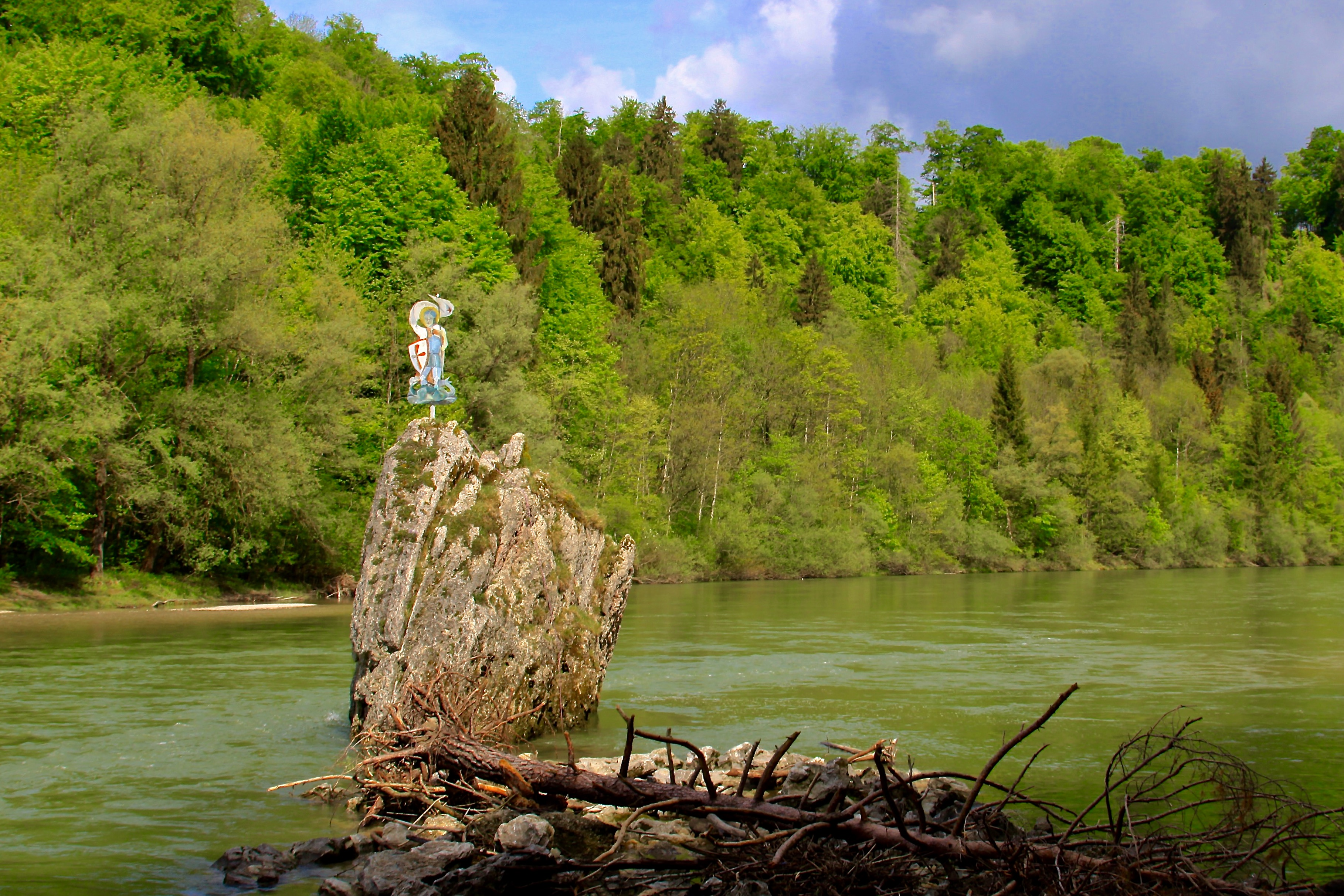 Georgenstein in der Isar. Oberes Isartal (FFH-Gebiet)